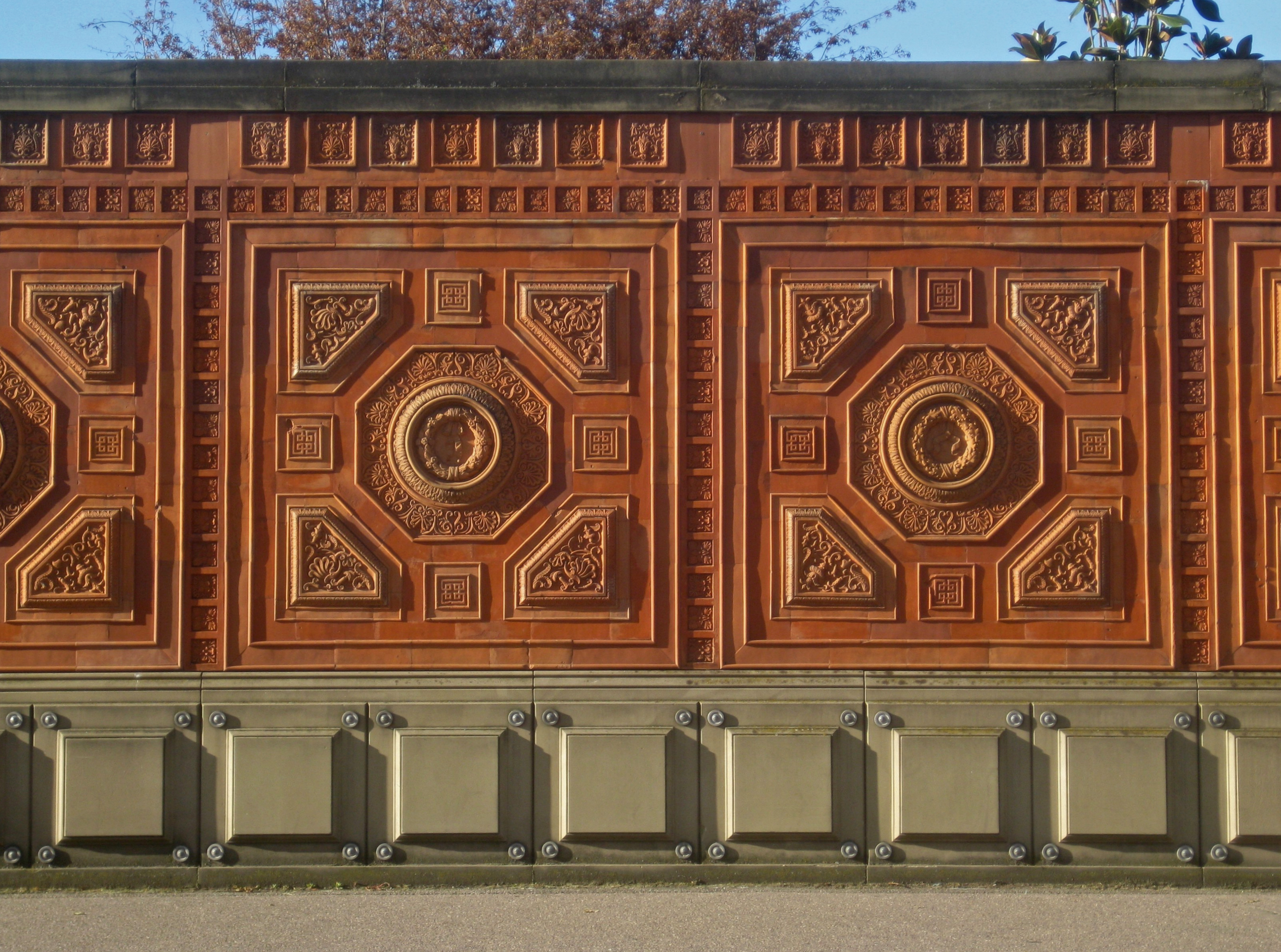 Karl Ludwig von Zanth: Terrakotta-Fries, Entstehungsjahr 1856, Stuttgart, Wilhelma, Wandelgang an der Neckartalstraße. Ausschnitt: links Relief-Fries mit Lorbeerkranz-Medaillon, rechts mit Eichenkranzmedaillon. Von oben nach unten: Mauerkrone aus Sandstein waagerechtes Anthemion (Band aus Lotos- und Palmettenkacheln) zwei Relief-Friese mit Rahmen aus Rosettenkacheln kassettierter Sandsteinsockel